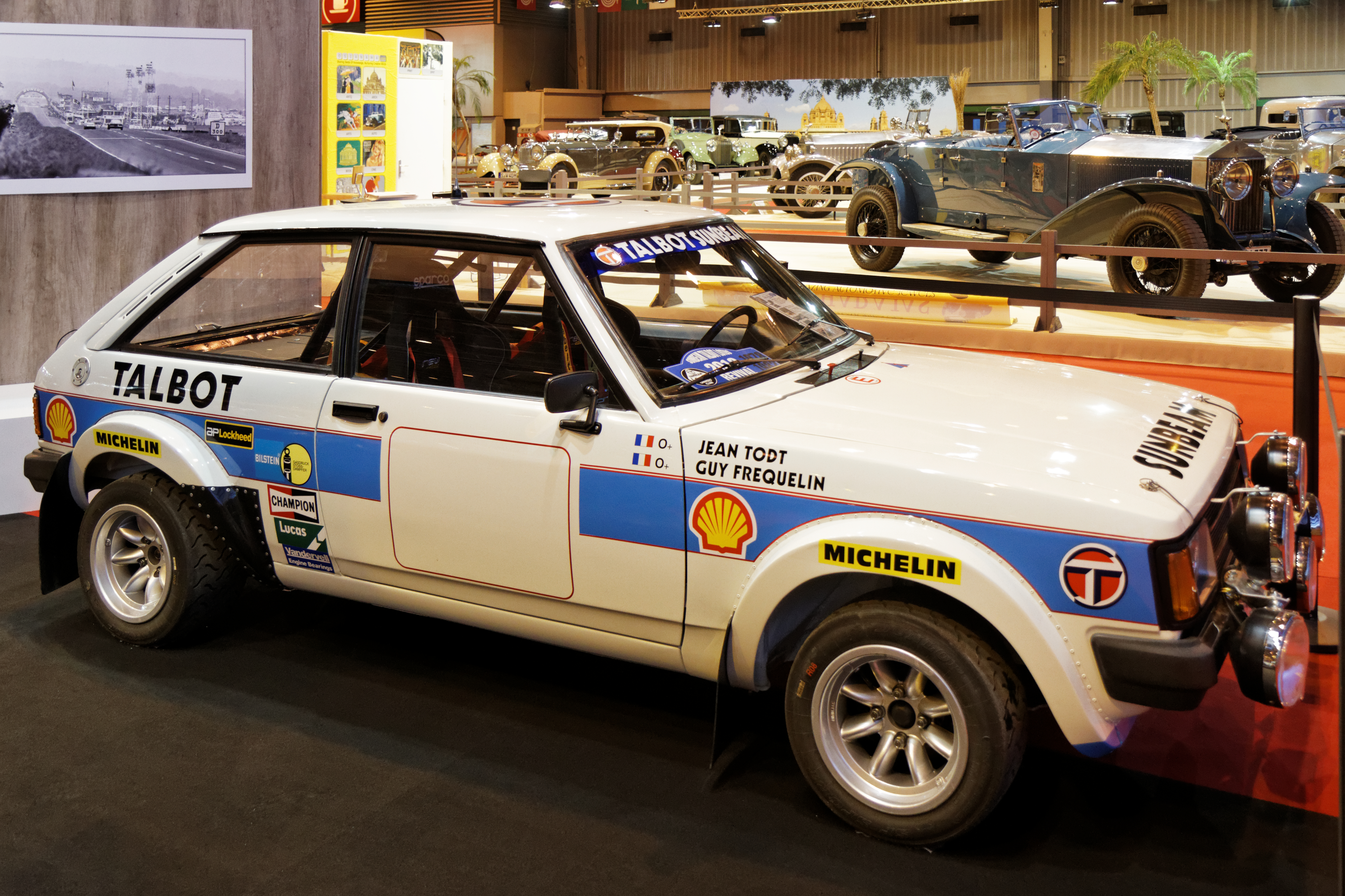 La Talbot KDU 111 V exposée lors du salon Retromobile 2014